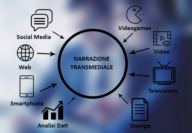 Immagine sintetica ma esplicativa dei media che ruotano attorno alla narrazione transmediale